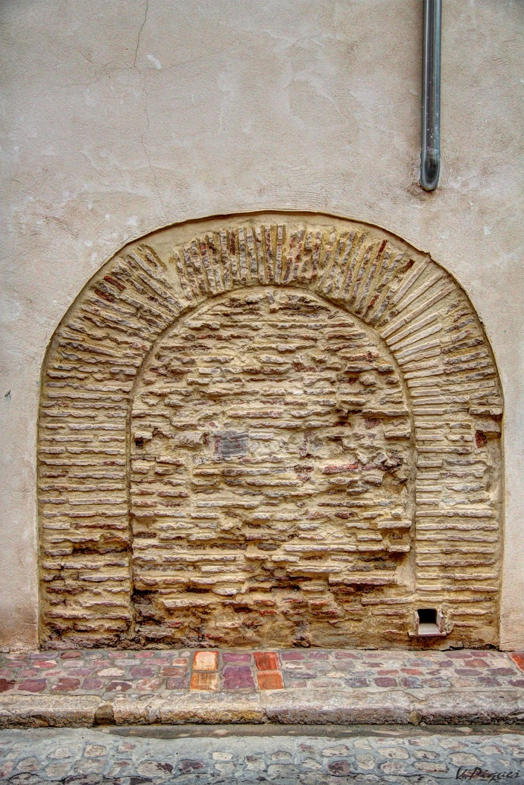 Façana de la Casa del Bou